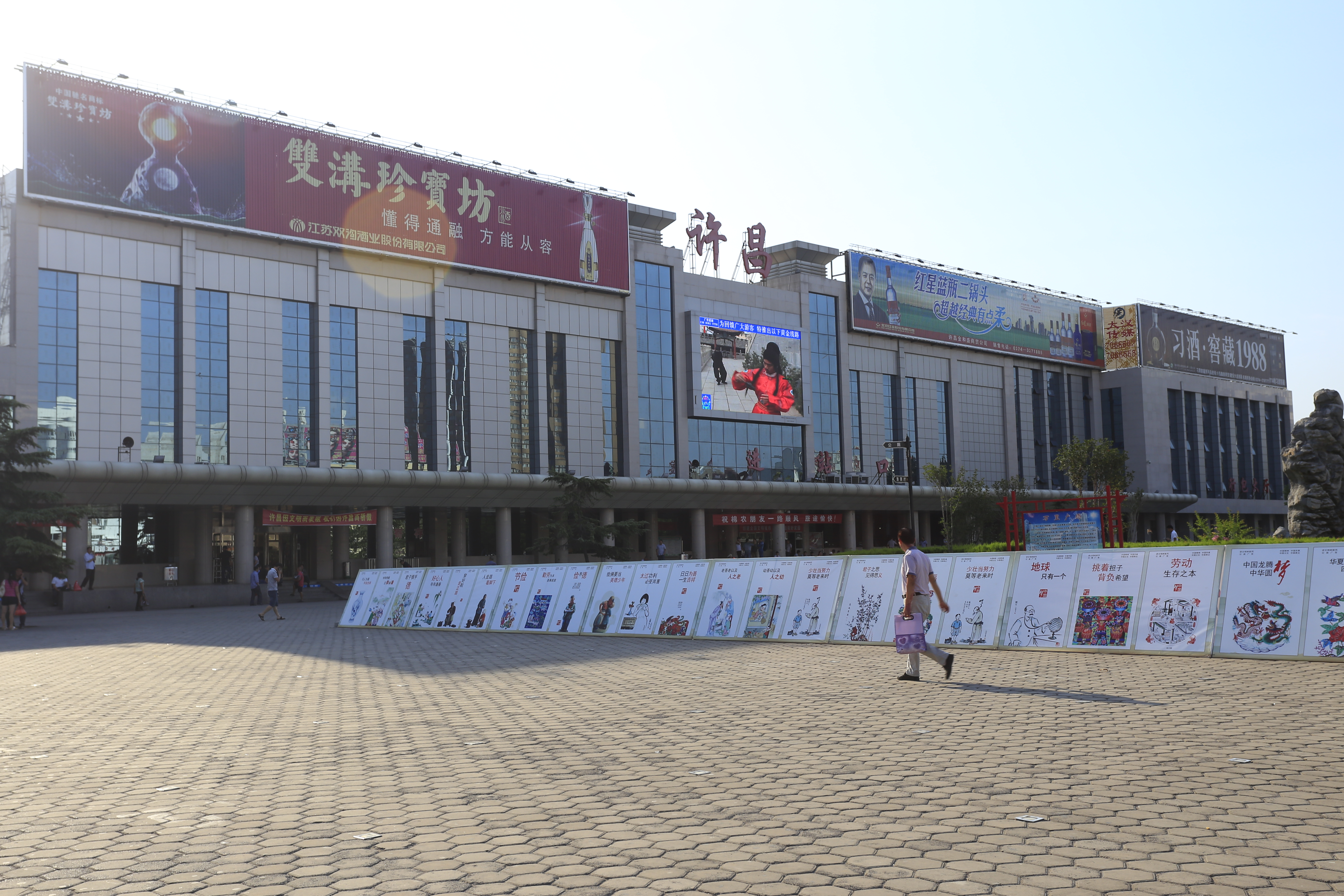 许昌站